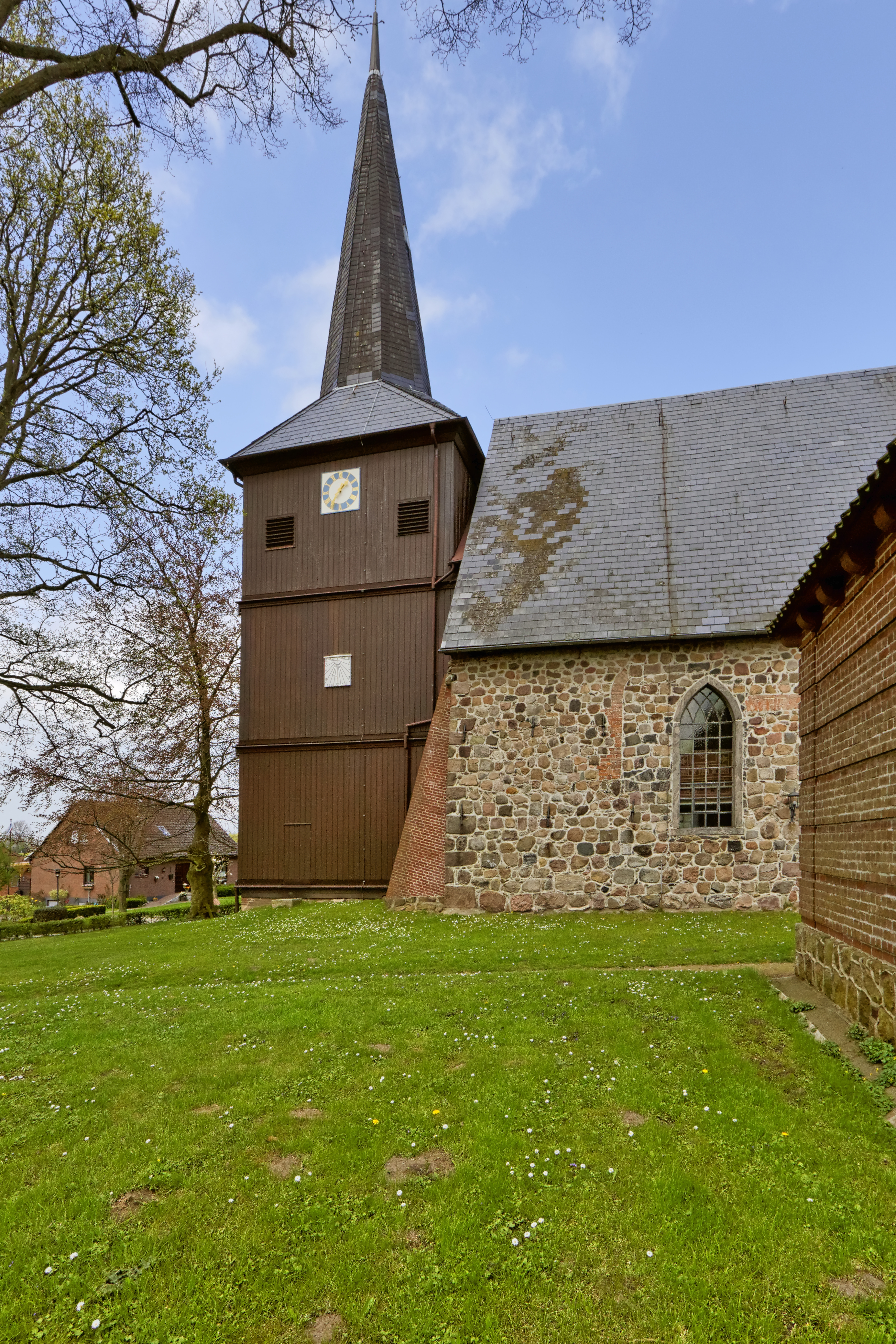 Bovenau, An der Kirche; Kirchengebäude